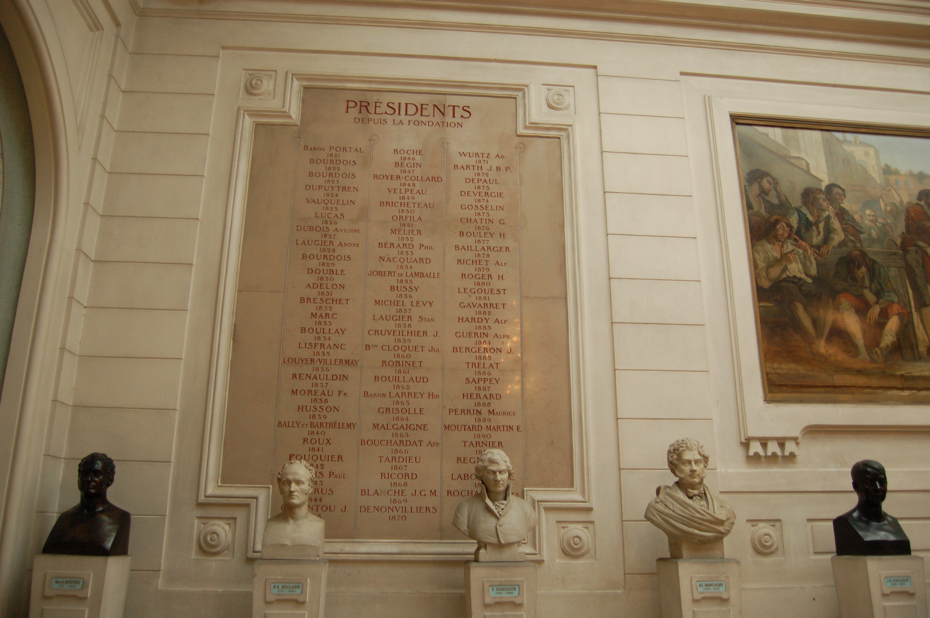 Liste des présidents de l'Académie nationale de Médecine, Paris, Franceet bustes de Guillaume Dupuytren, 1835, bronze bust by Antoine Desboeufs, Pierre-Augustin Béclard, François Chaussier, A. C. Baudelocque, Jean-Nicolas Marjolin